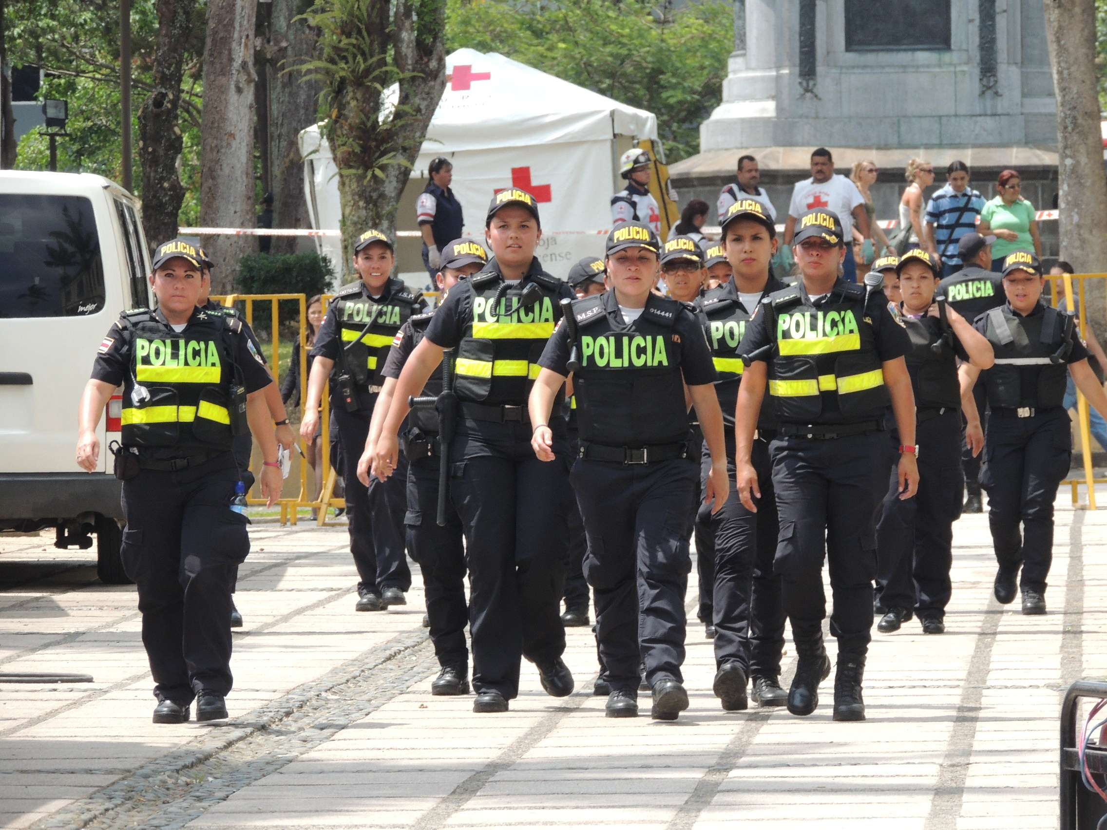 Policía resguarda Asamblea Legislativa de Costa Rica tras enfrentamiento con manifestantes